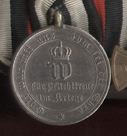 Deutsches Reich, Kriegsdenkmünze 1870/71 für Nichtkämpfer, Vorderseite